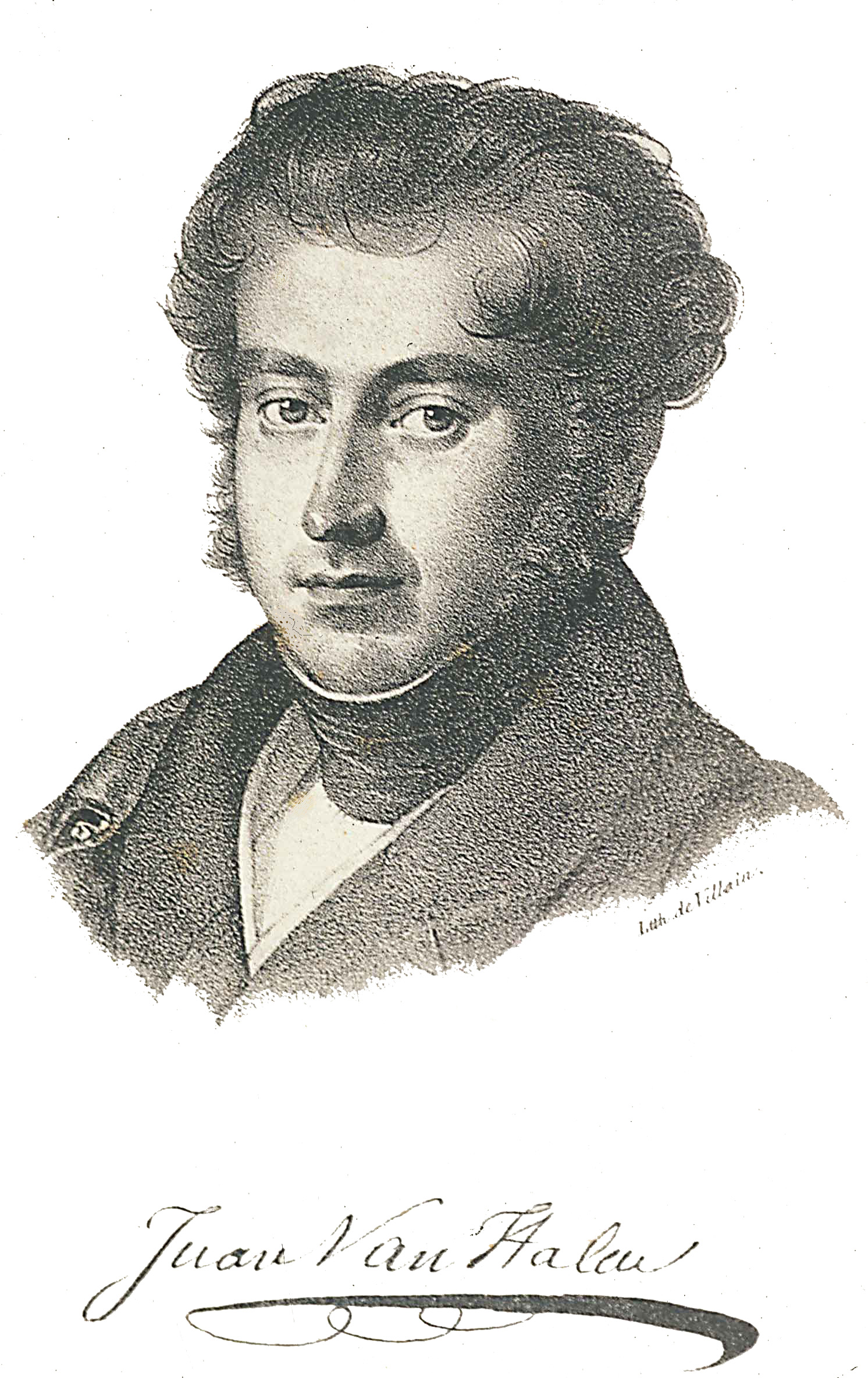 Retrato del militar y marino español Juan Van Halen y Sartí (1788–1864).